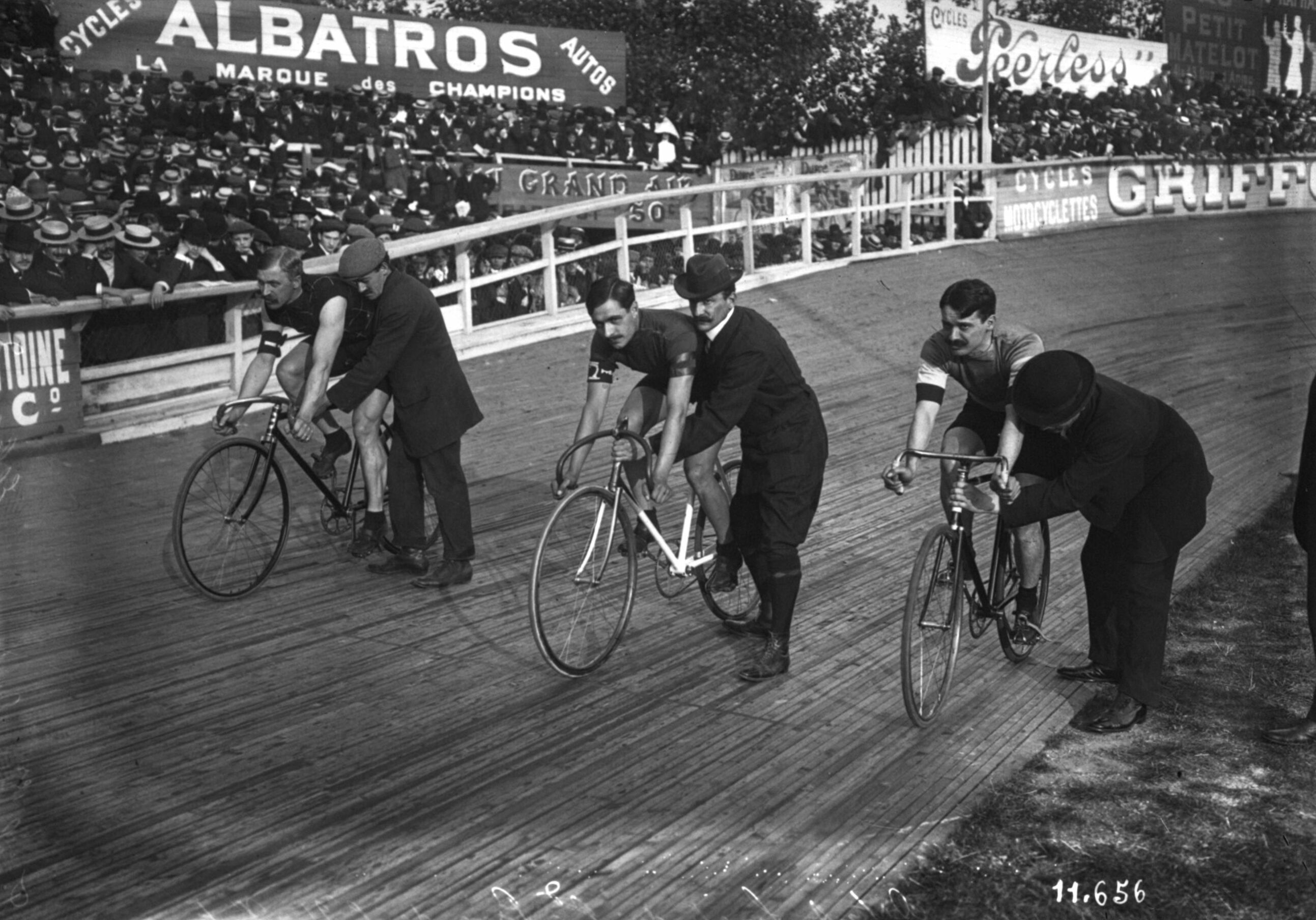 9 octobre 1910, Buffalo, départ de la finale du Grand prix de l'U. V. F. : Friol 1er, Dupuy, Ellegaard